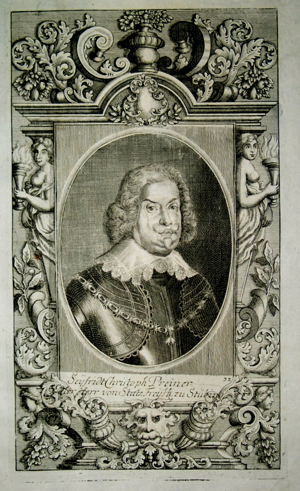 Seifried Freiherr von Breuner / Breiner (gest. 1651): Seyfridt Christoph Preiner. Edler Herr von Statz Freyh. zu Stübing. Wurde 1620 von Ferdinand II. mit dem Amt des Obersten Erb-Kämmerers im Erzherzogtum Österreich unter der Ens belehnt; Ritter des Goldenen Vlieses.